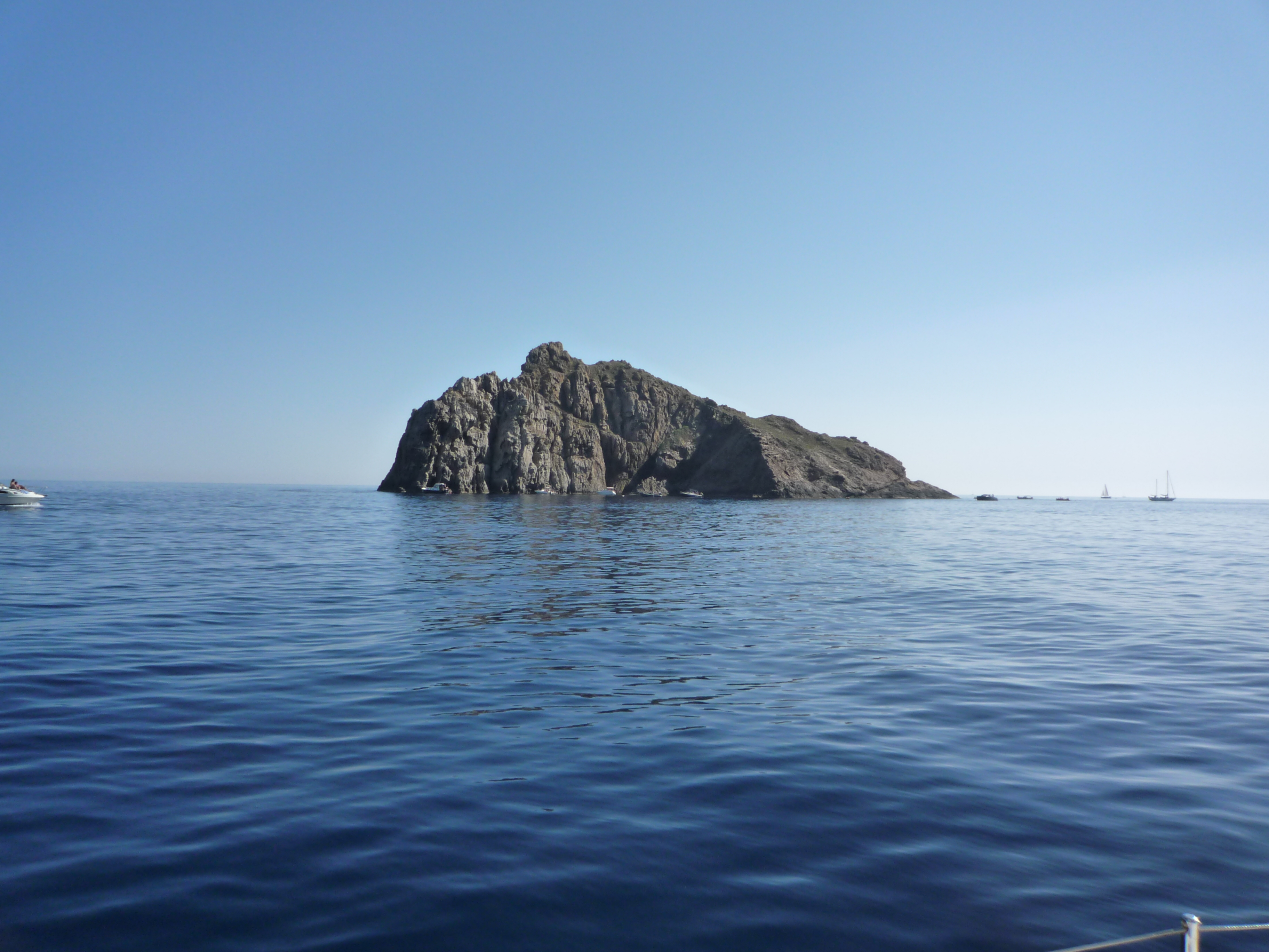 L'ilot de la Gabinière, spot de plongée célèbre à Port Cros